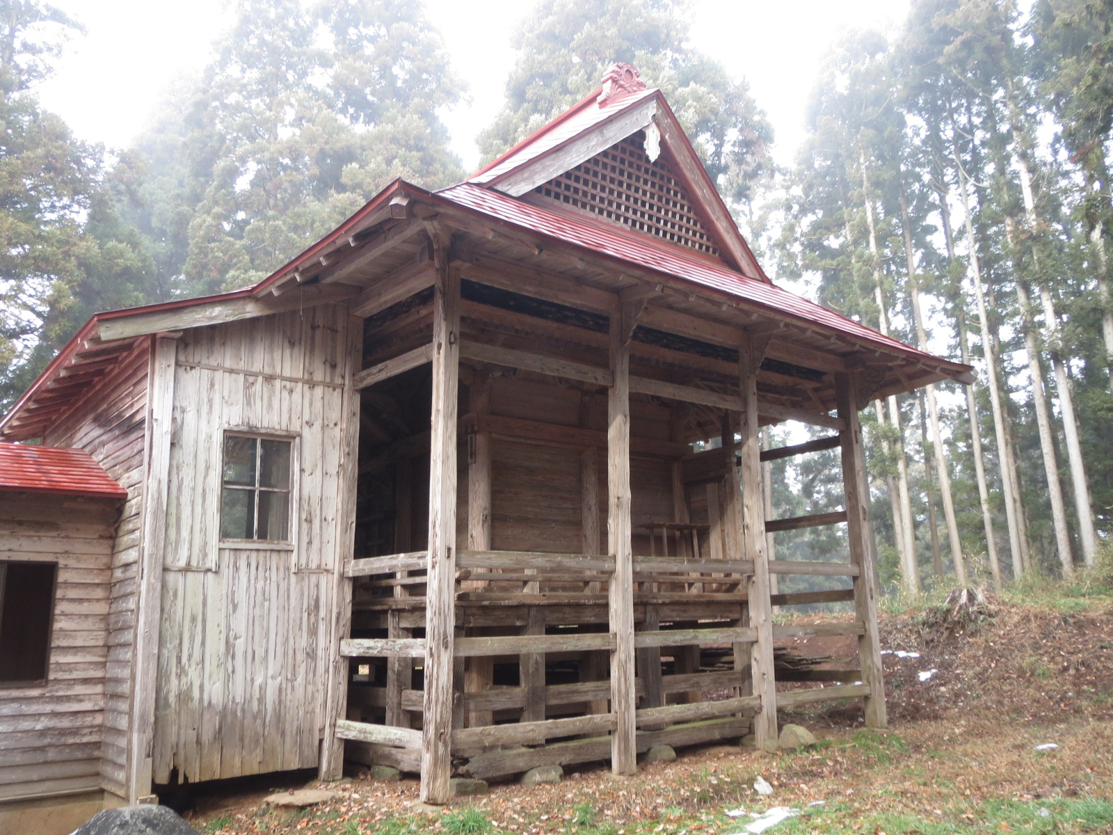 北上市黒岩にある白山神社本殿 Canon IXY 3